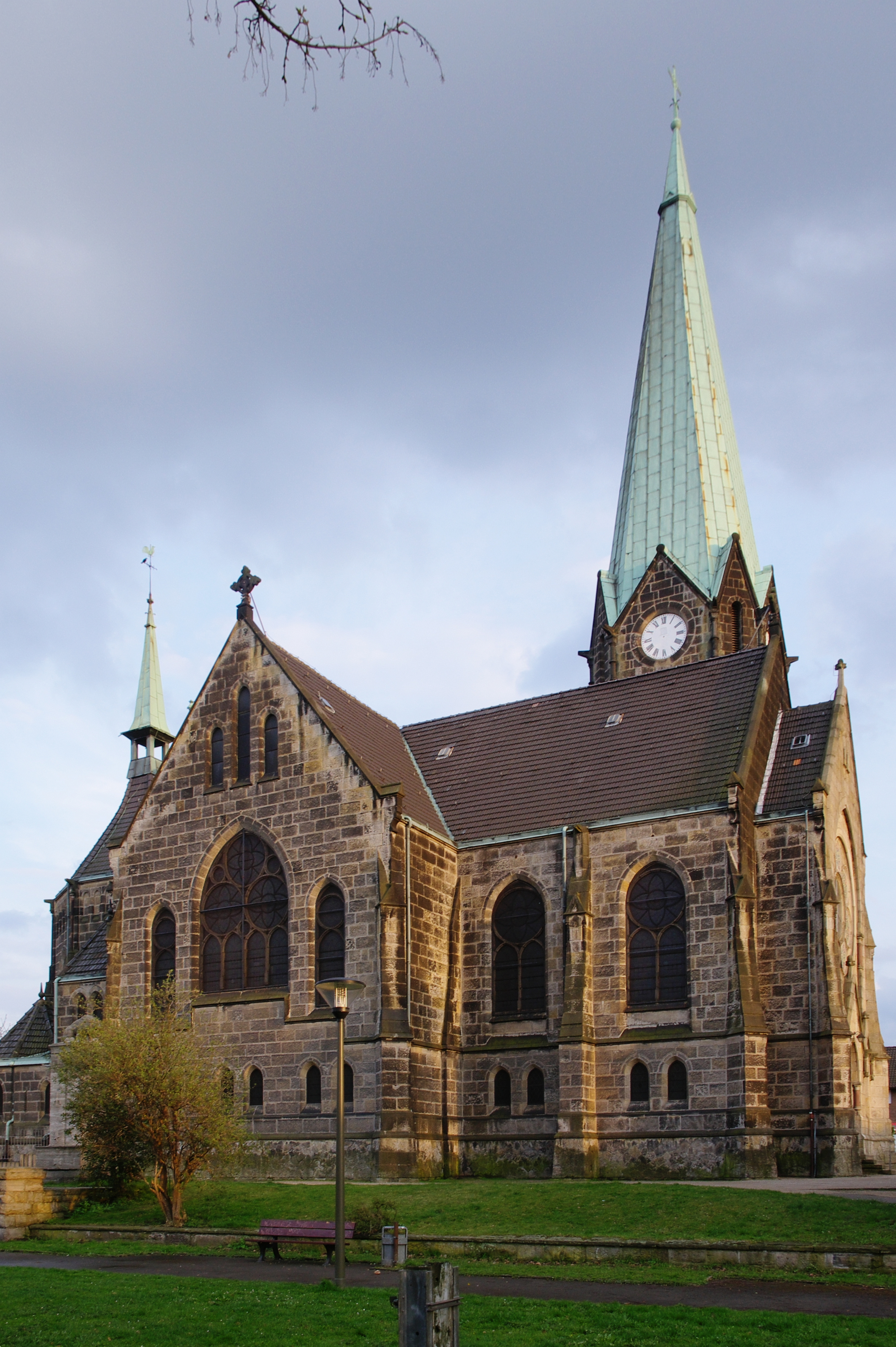 Ev. Lutherkirche, Dortmund-Asseln This is a photograph of an architectural monument. 0189